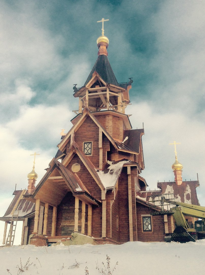 церковь